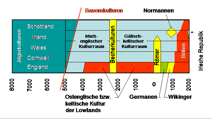 Großbritannien